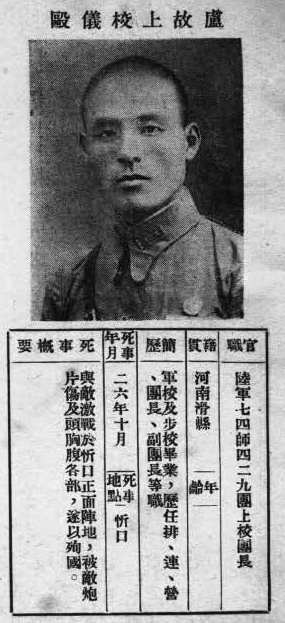 中文（台灣）: 抗戰軍人忠烈錄第一輯中的烈士遺像